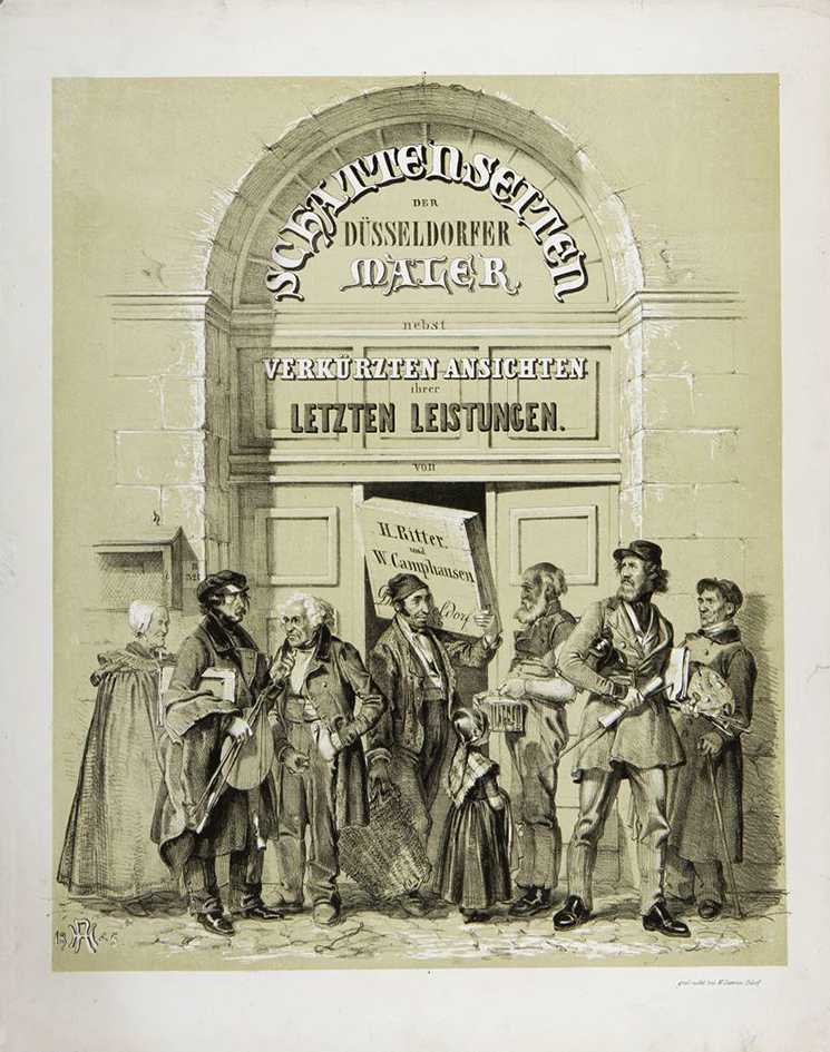 Titelblatt von Schattenseiten der Düsseldorfer Maler, nebst verkürzten Ansichten ihrer letzten Leistungen, 1845 – mit Monogramm HR für Henry Ritter